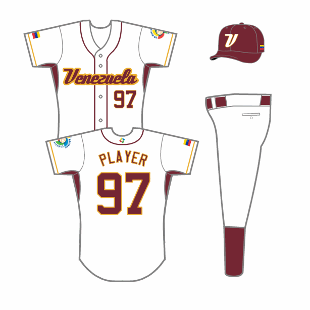 home uniform